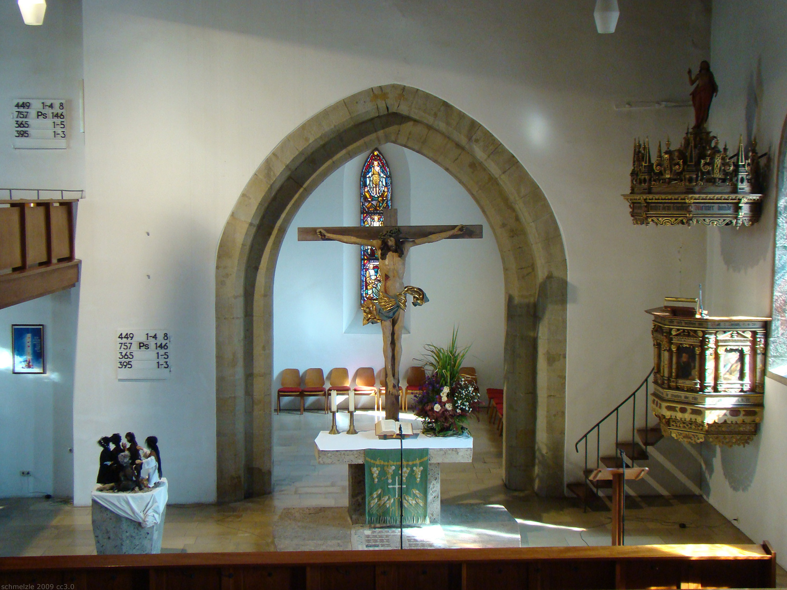 Stadtkirche St. Jakobus in Brackenheim